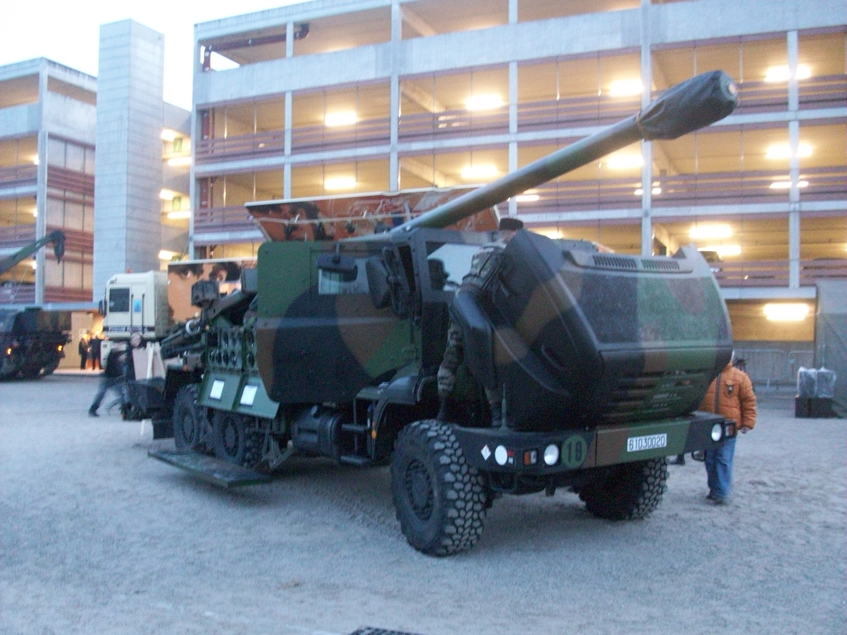 Présentation de véhicules de l'armée française devant Rivétoile, Strasbourg